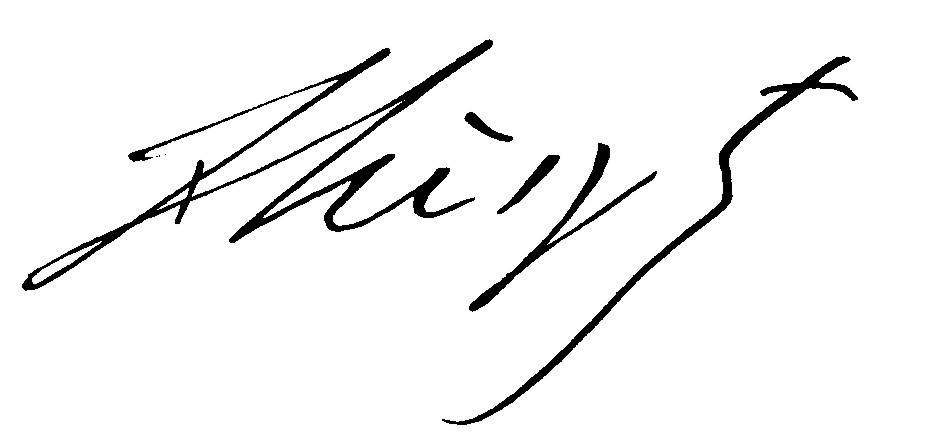 Signature de Franz Liszt